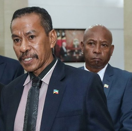 Francisco David Xavier Carlos, Chef der UDT und im Hintergrund João Gomes